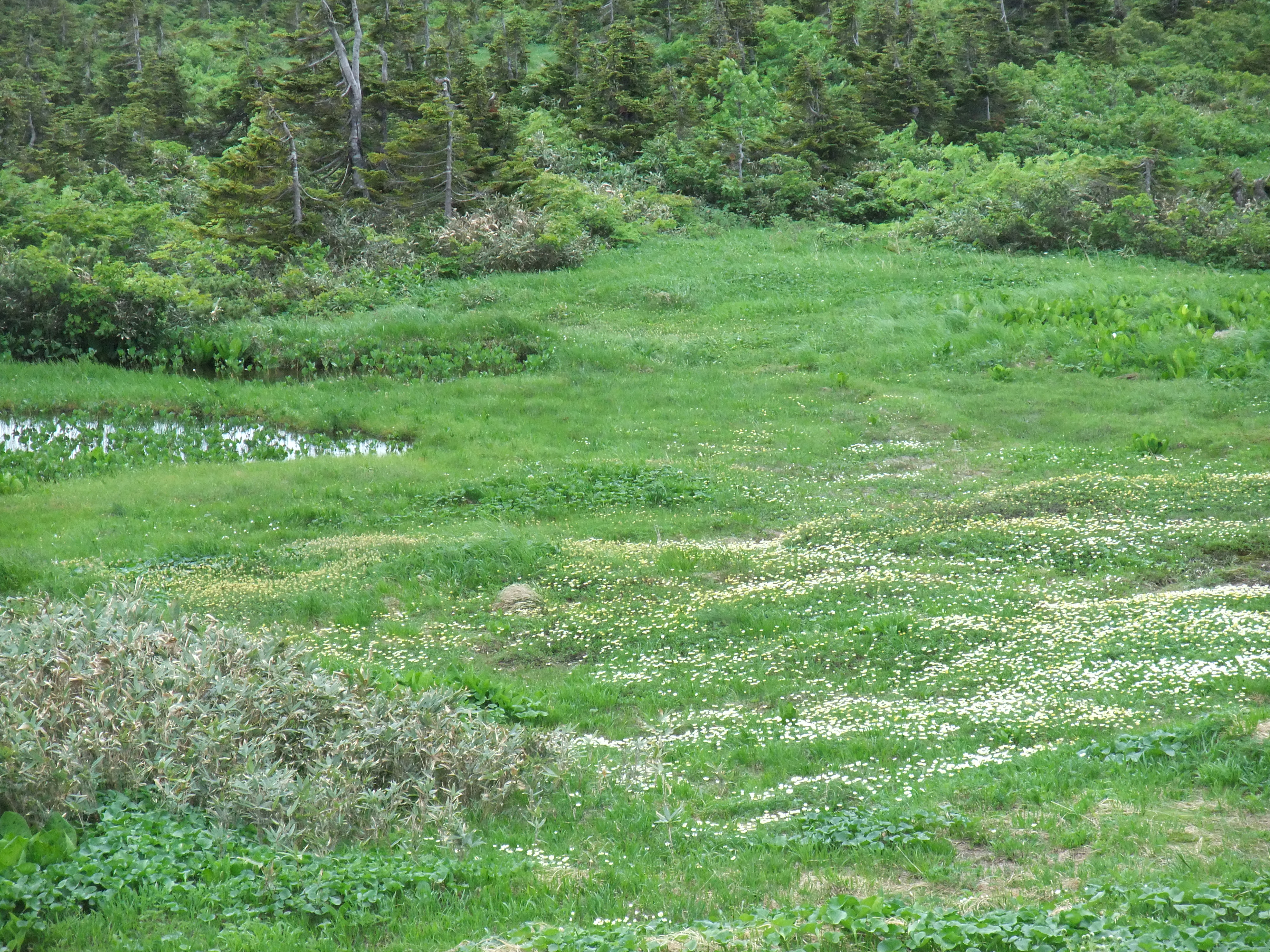 南八甲田のヒナザクラが群生する黄瀬萢